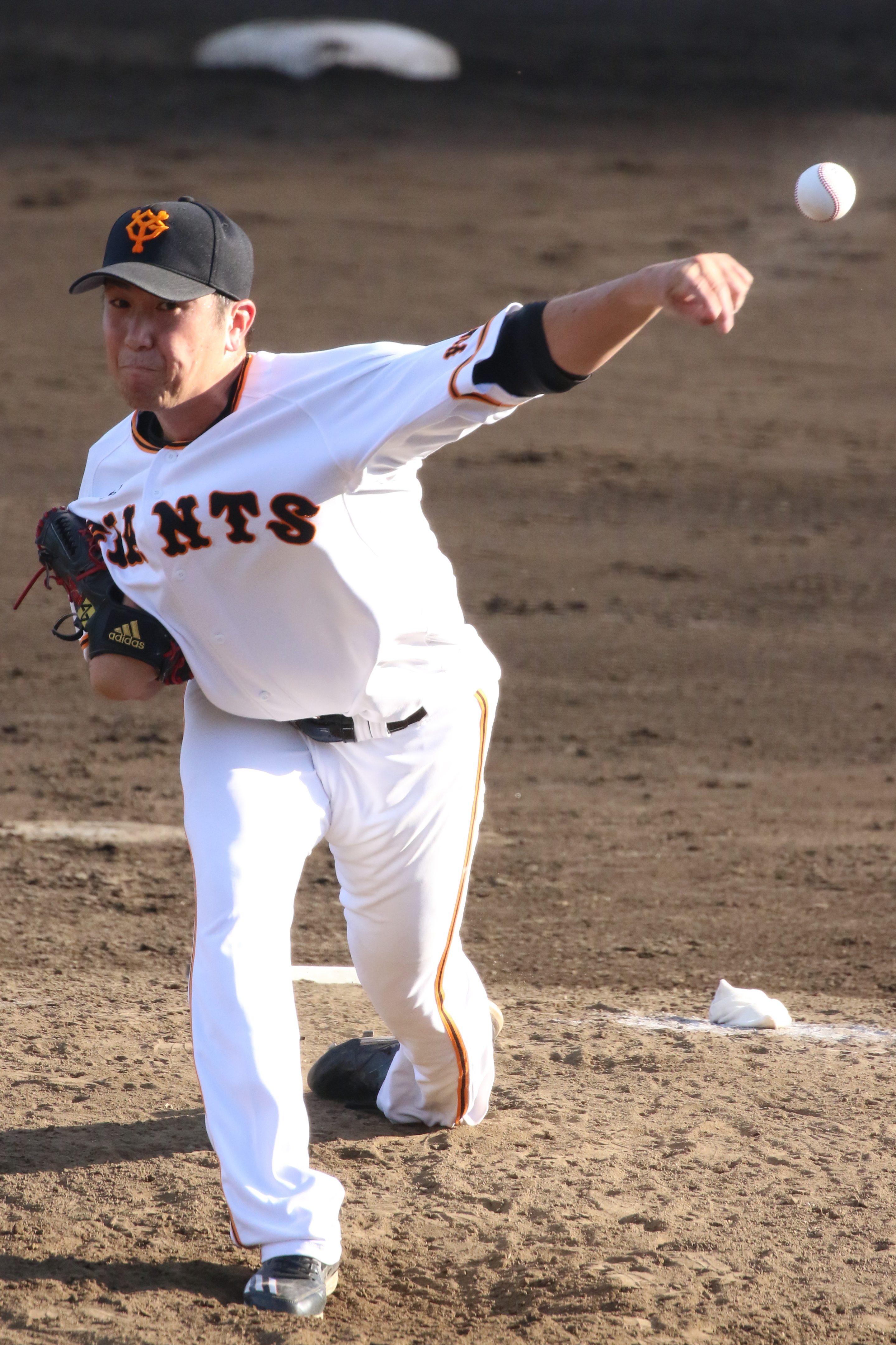 ジャイアンツ山口選手